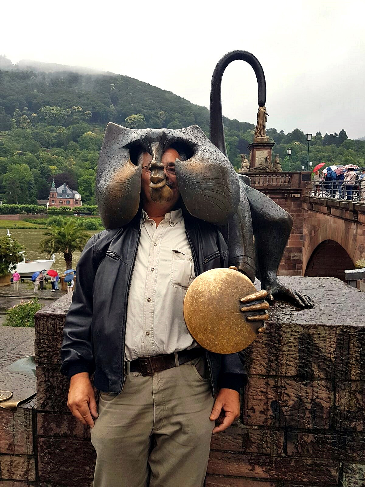 Heidelberger Brückenaffe mit Person innseitig